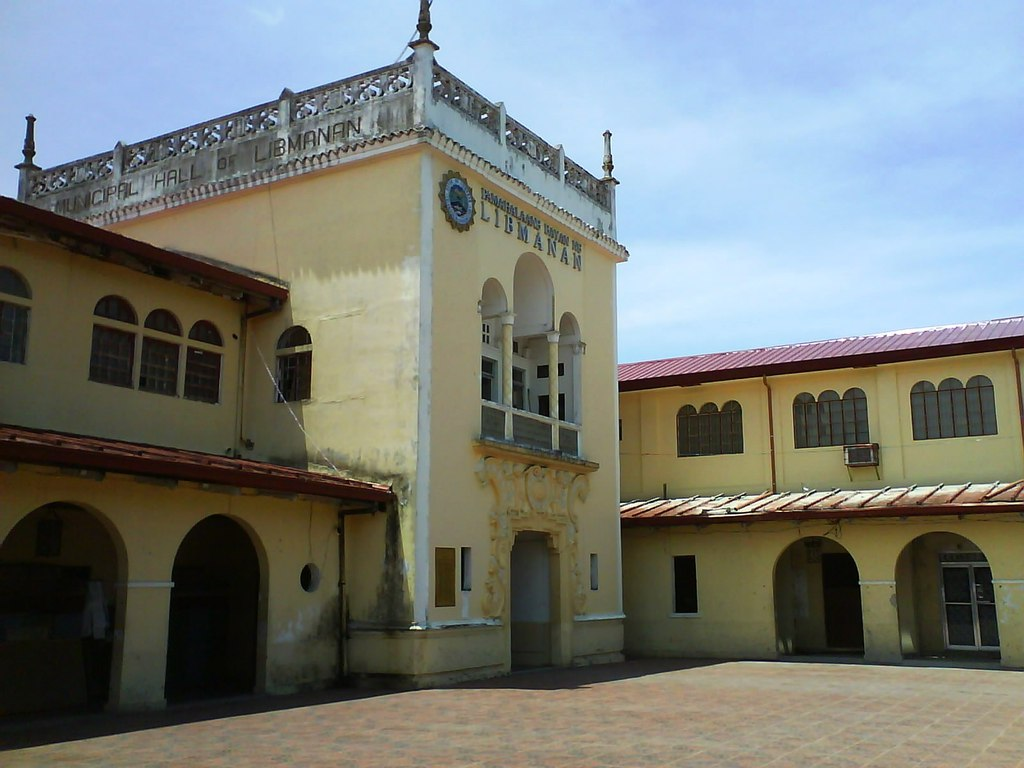 Libmanan, Camarines Sur, Philippines